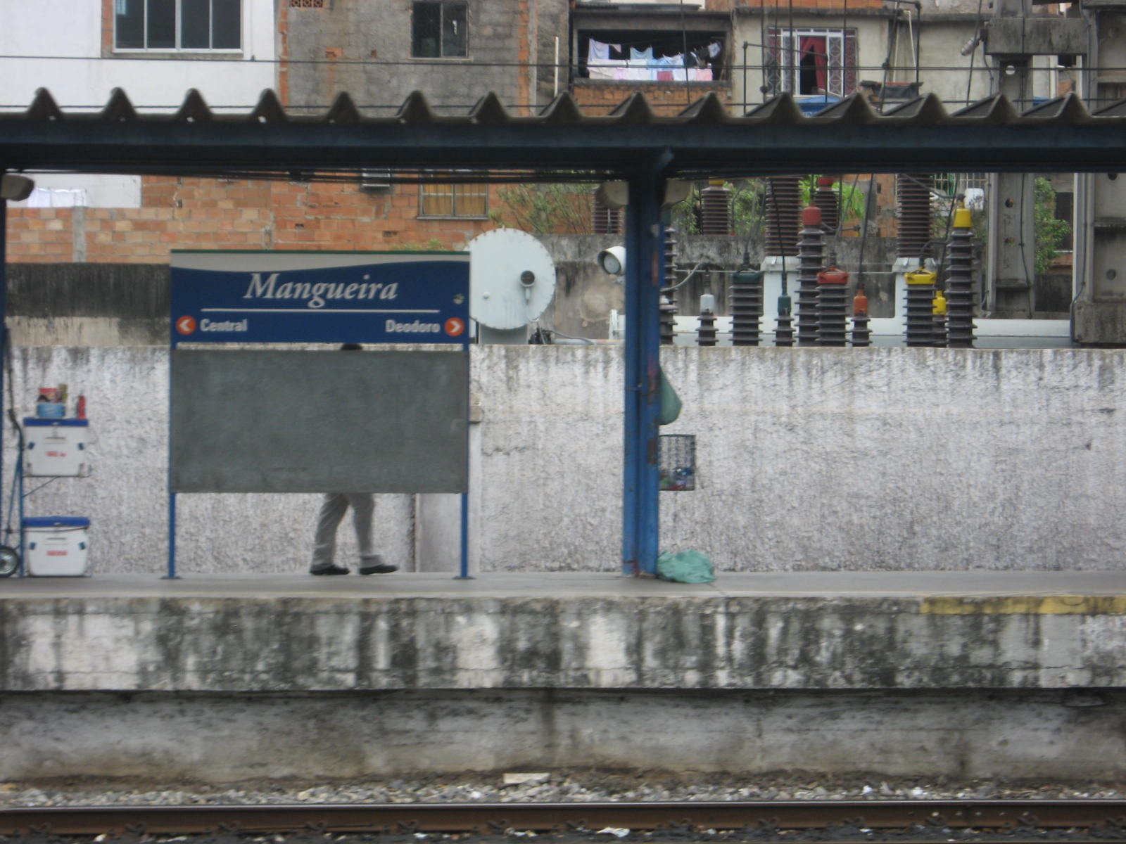 Estação ferroviária de Mangueira no Rio de Janeiro.